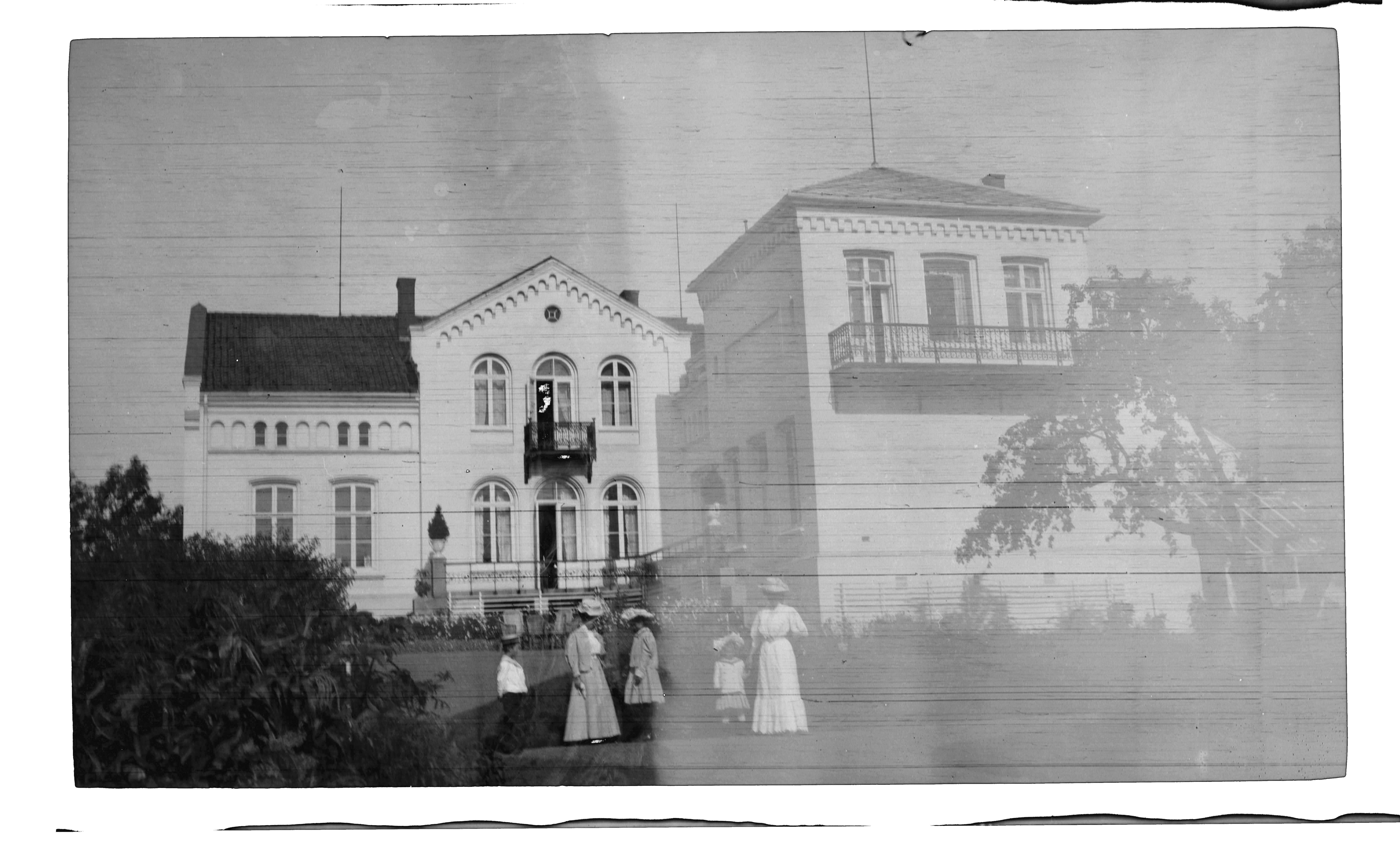 Bildet er hentet fra Nasjonalbibliotekets bildesamling Drammensveien, Oslo, Oslo